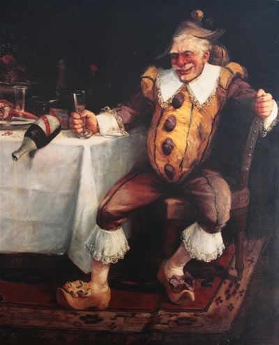 L'ivresse de Polichinelle by Joseph Faverot (b. 1862)